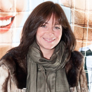 Екатерина Редникова на премьере кинокомедии "Выкрутасы".